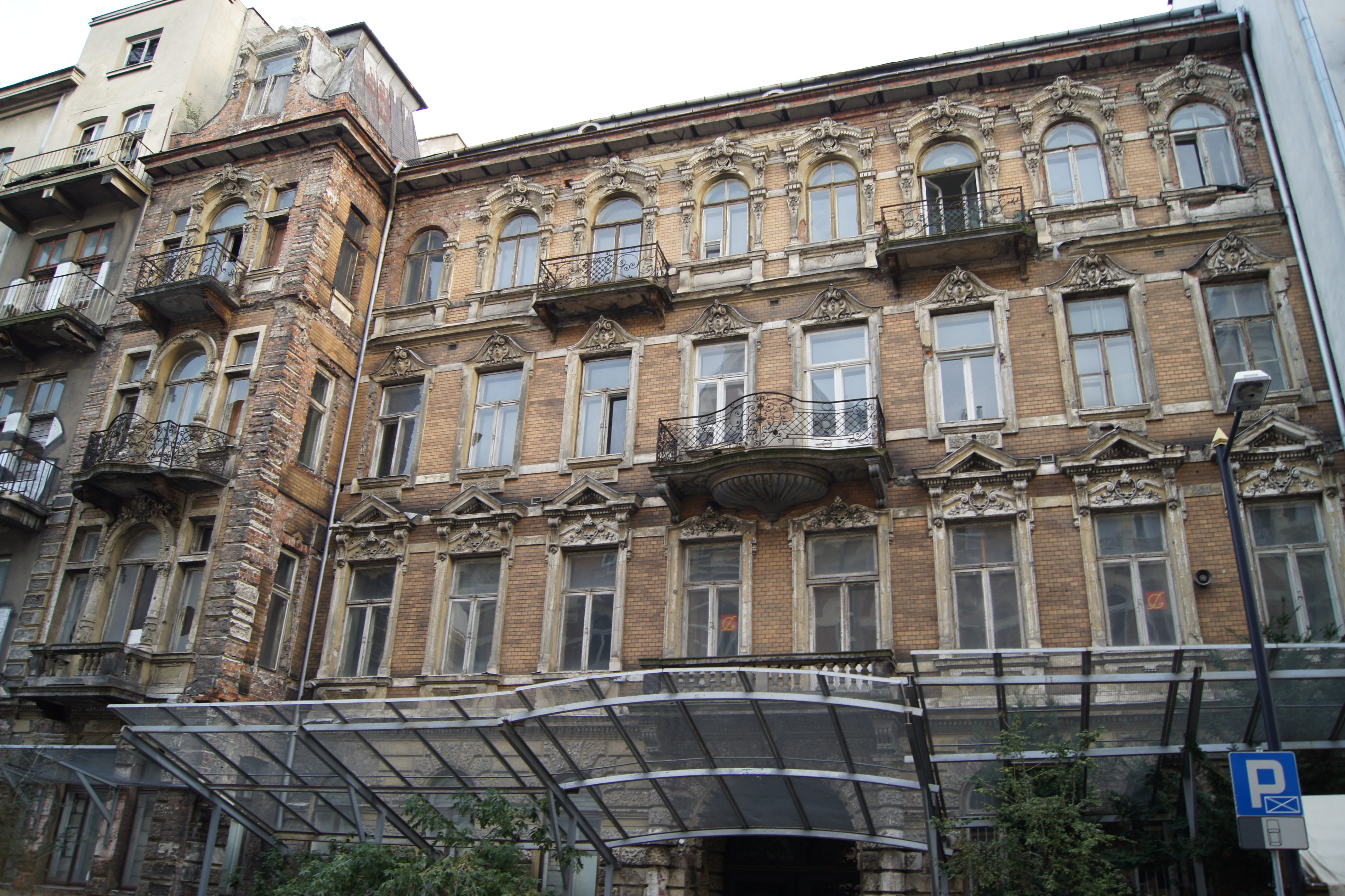 kamienica, ul. Foksal 15, Warszawa, dz. Śródmieście